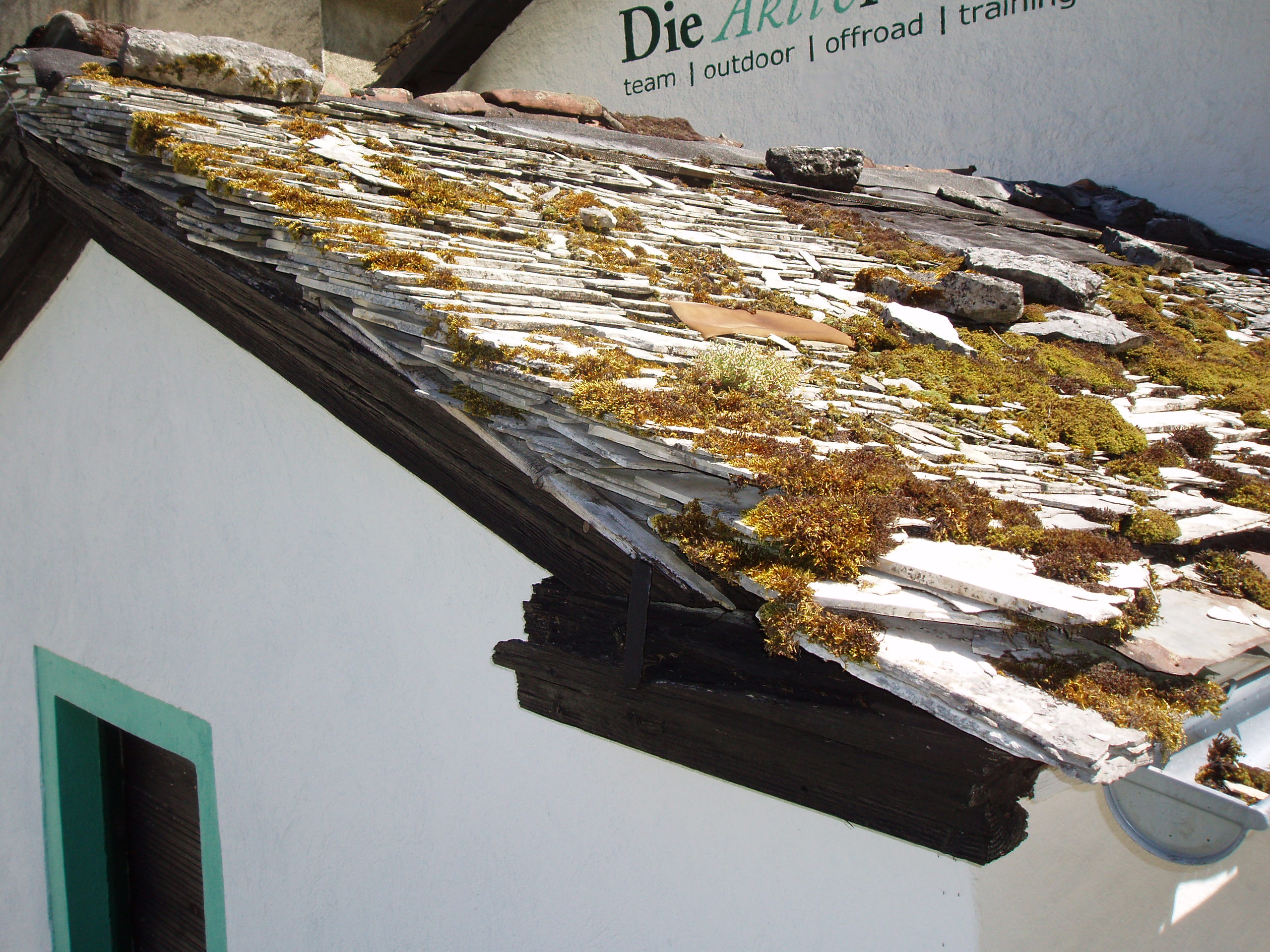 Kalkplatten Legschiefer Dach im Altmühltal (Hefele-Mühle in Solnhofen) Kalkplatten Legschiefer Dach im Altmühltal (Hefele-Mühle in Solnhofen)